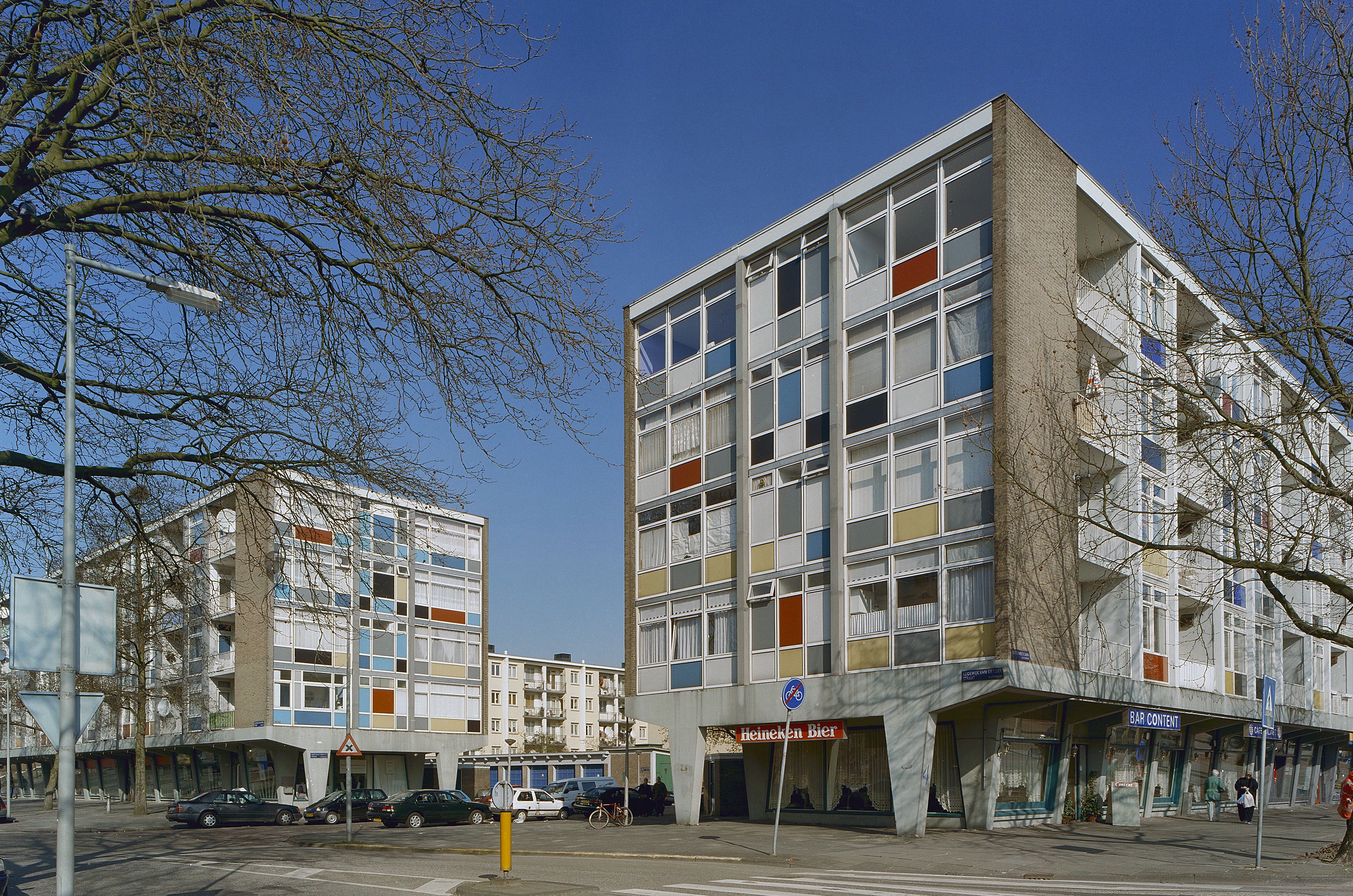 Tuinstad Slotermeer: Overzicht vanaf kruising (opmerking: Gefotografeerd voor Monumenten van Herrezen Nederland)